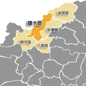 鹽水區相對位置